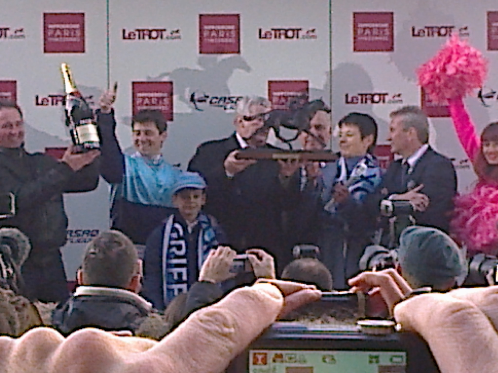 Eric Raffin fêtant sa victoire sur le podium après le prix du Cornulier 2014.